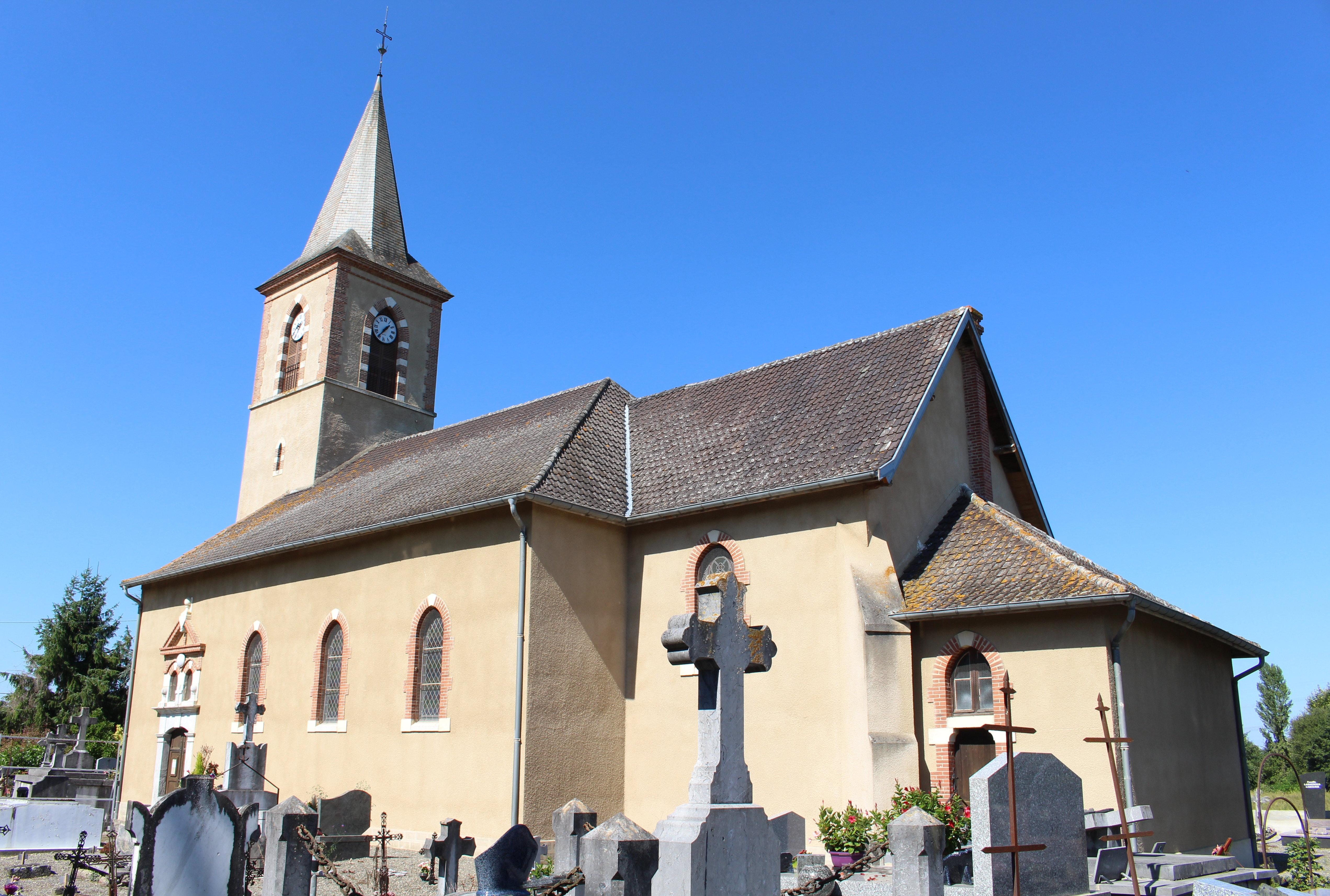 Église Saint Saturnin de Bazillac (Hautes-Pyrénées)